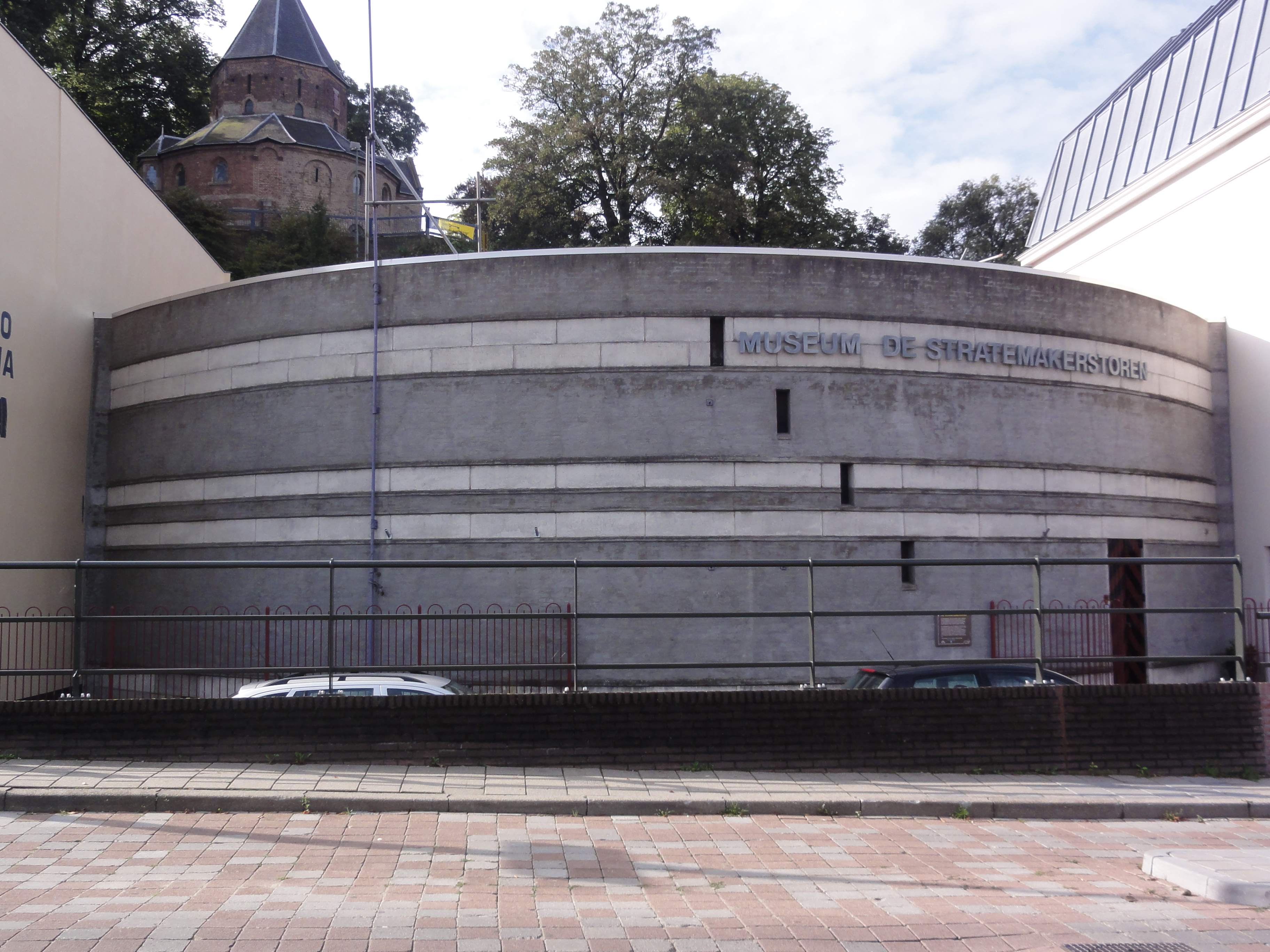 Nijmegen Rijksmonument 31188 Waalkade 84 06″ N, 5° 52′ 08.25″ E Object location51° 50′ 54.9″ N, 5° 52′ 10.83″ E